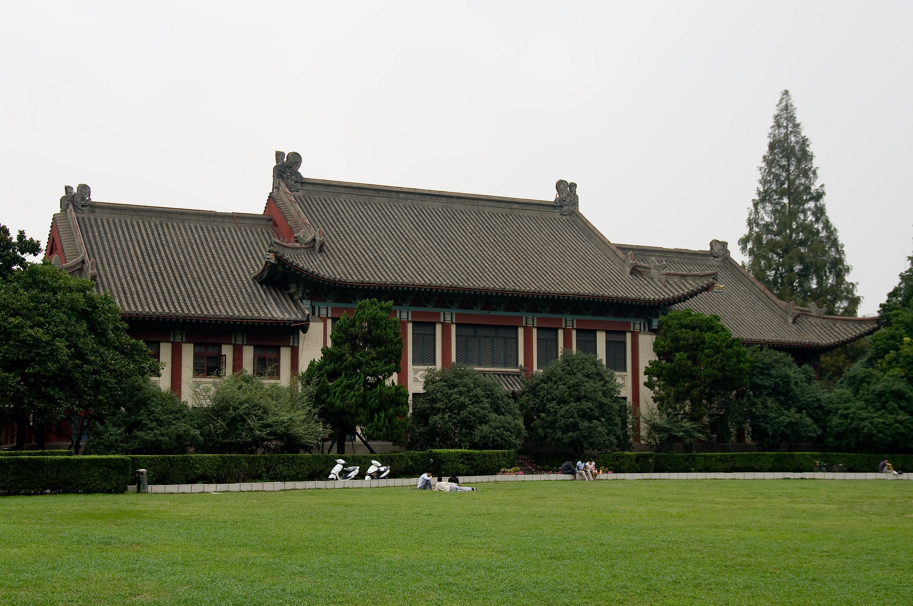 南京师范大学100号楼